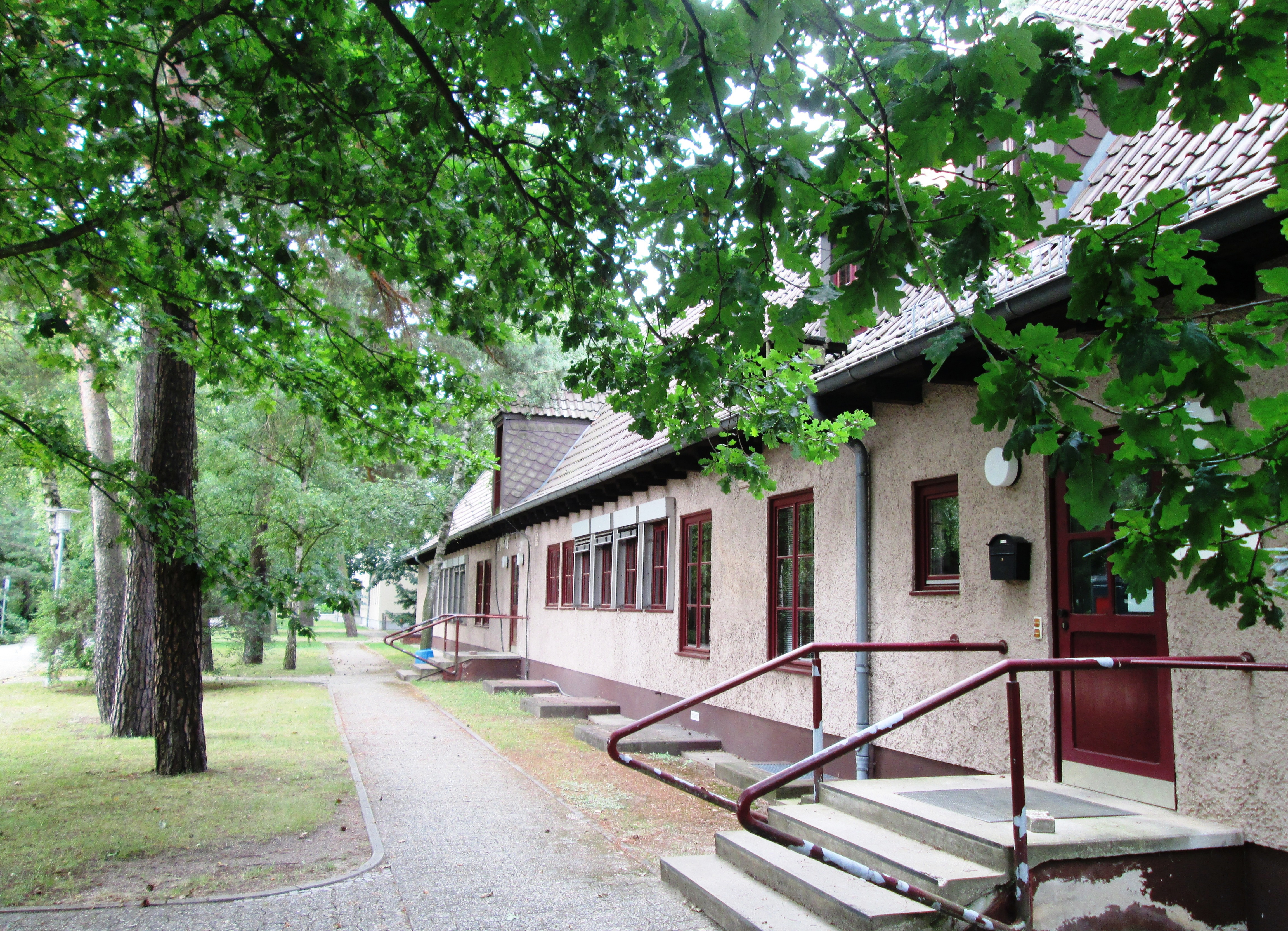 Berlin-Spandau, Wohnhaus der Arbeiterstadt "Große Halle" (1938), heute Krankenpflegeschule des Evangelischen Waldkrankenhauses Berlin-Spandau